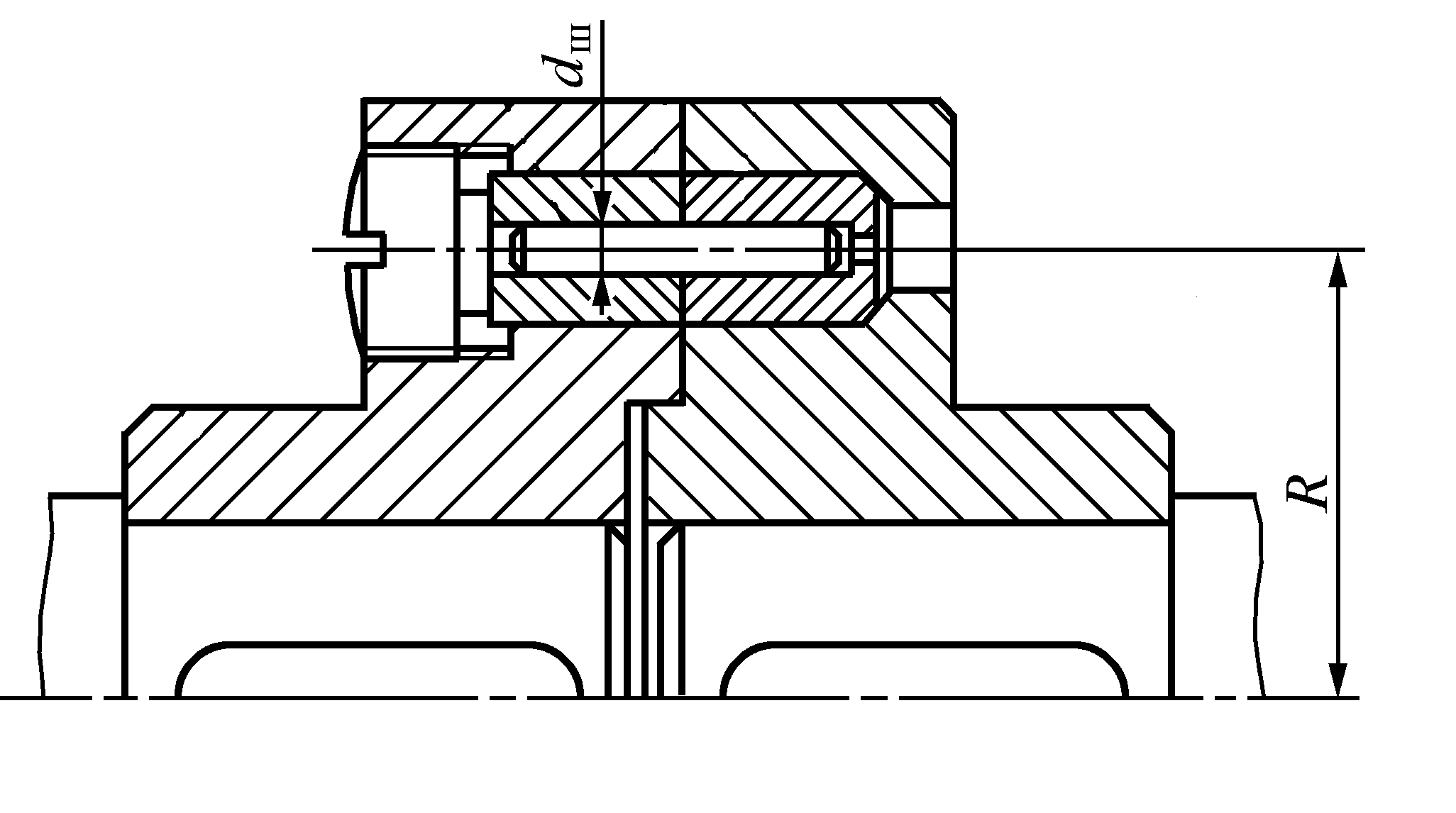 Предмет